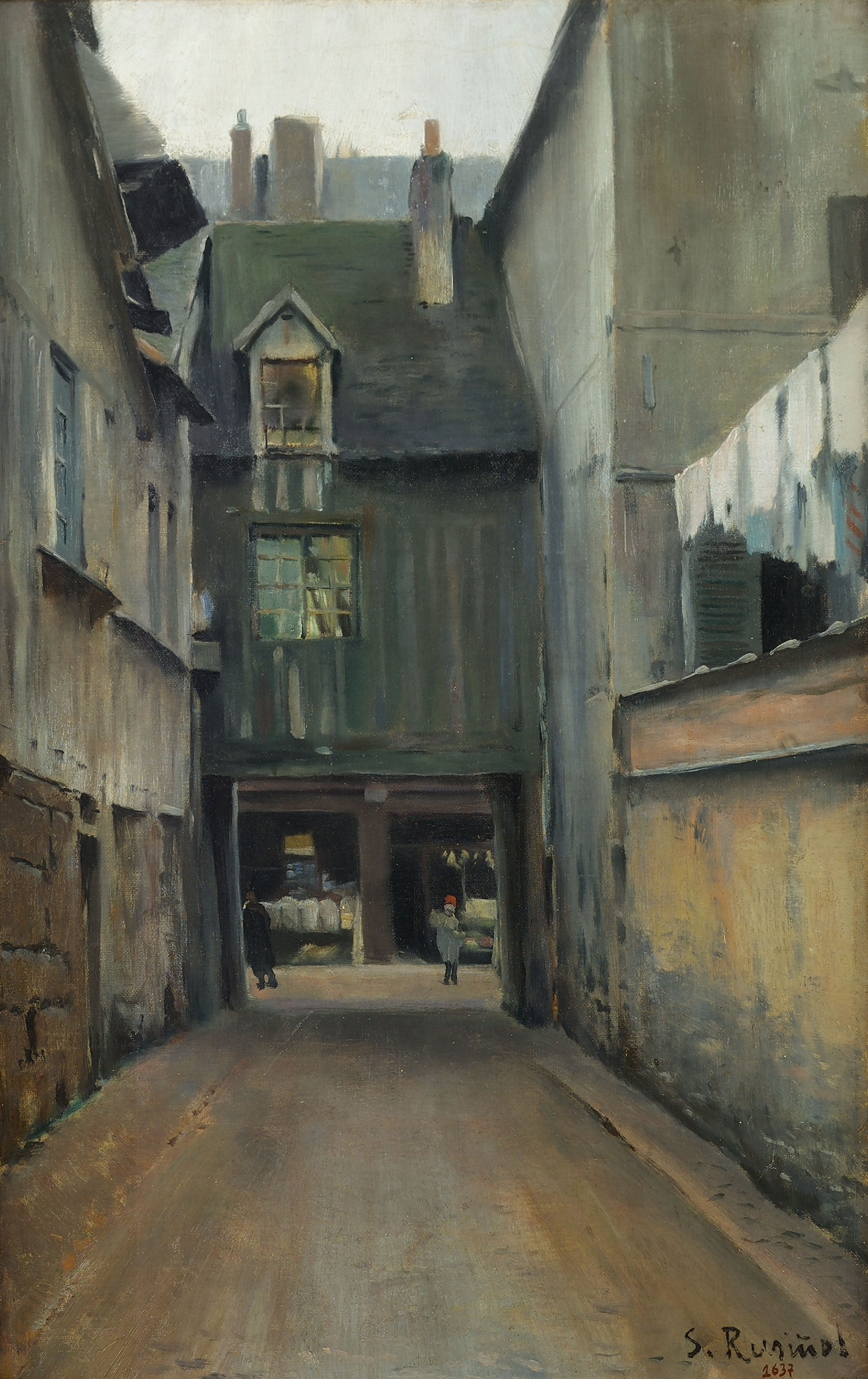 Vista en perspectiva d'un carrer del barri de Rouen de París. Tot és de color grisenc. Fons de figures dretes. Cases a banda i banda del carrer amb finestres, ximeneies i roba estesa